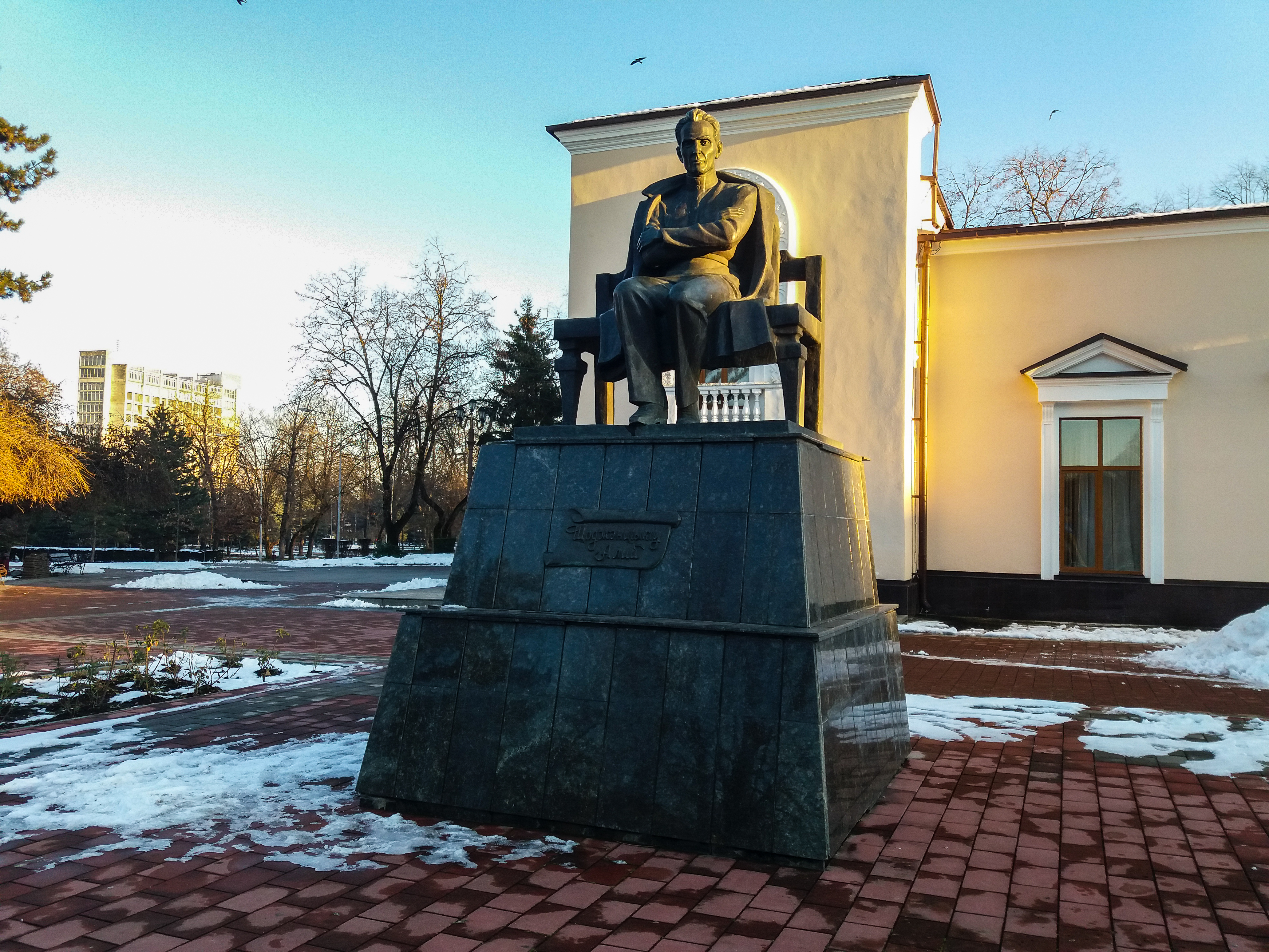 Памятник кабардинскому поэту Али Шогенцукову: проспект Шогенцукова, сквер у кабардинского госдрамтеатра им. А. Шогенцукова, Нальчик, Кабардино-Балкария